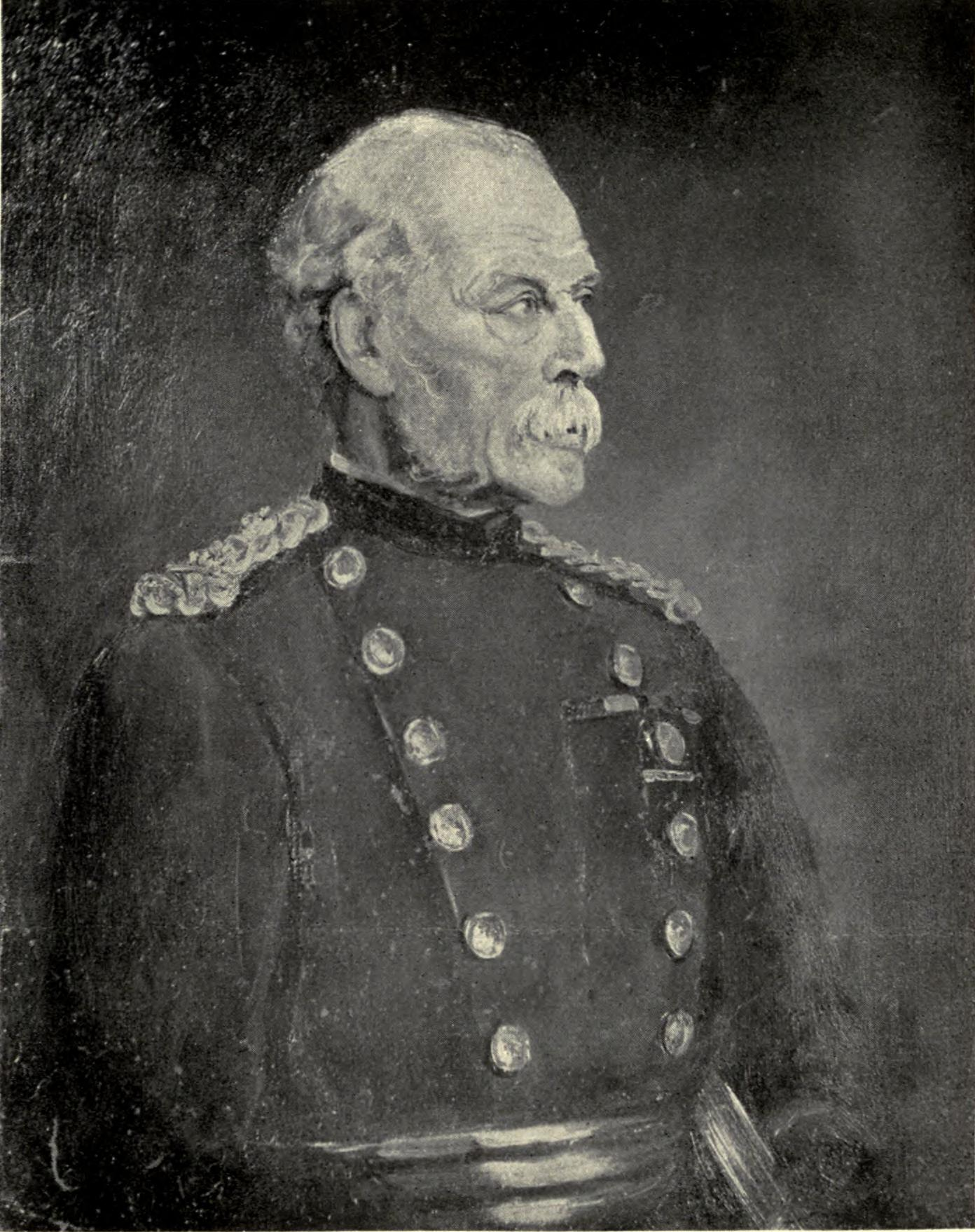 Sir Frederick Stephenson